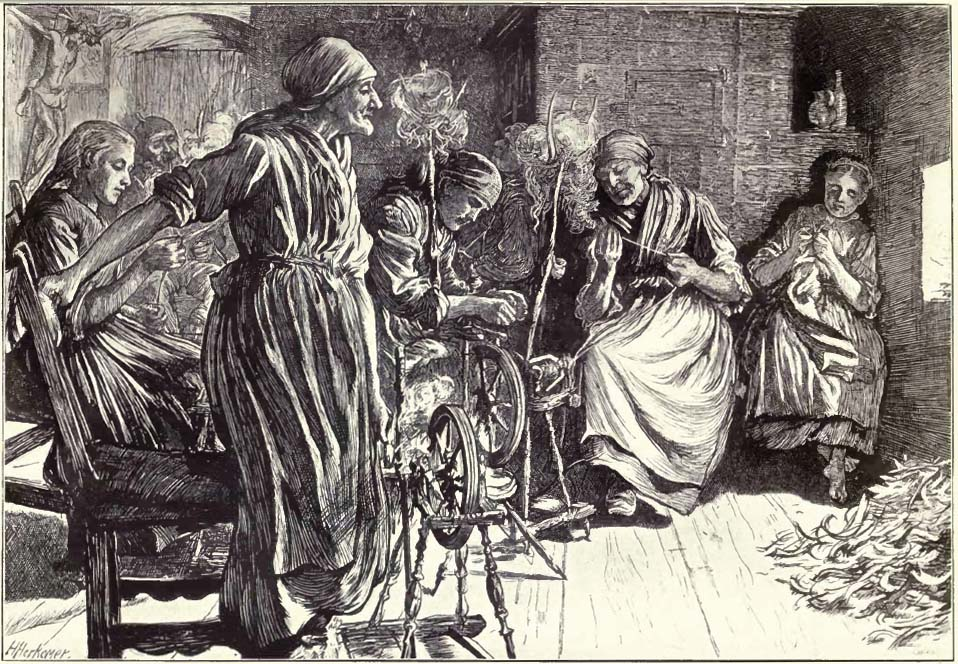 Hubert von Herkomer 1872~ - The Spinners (The Graphic, The Herkomers Vol.1).jpg